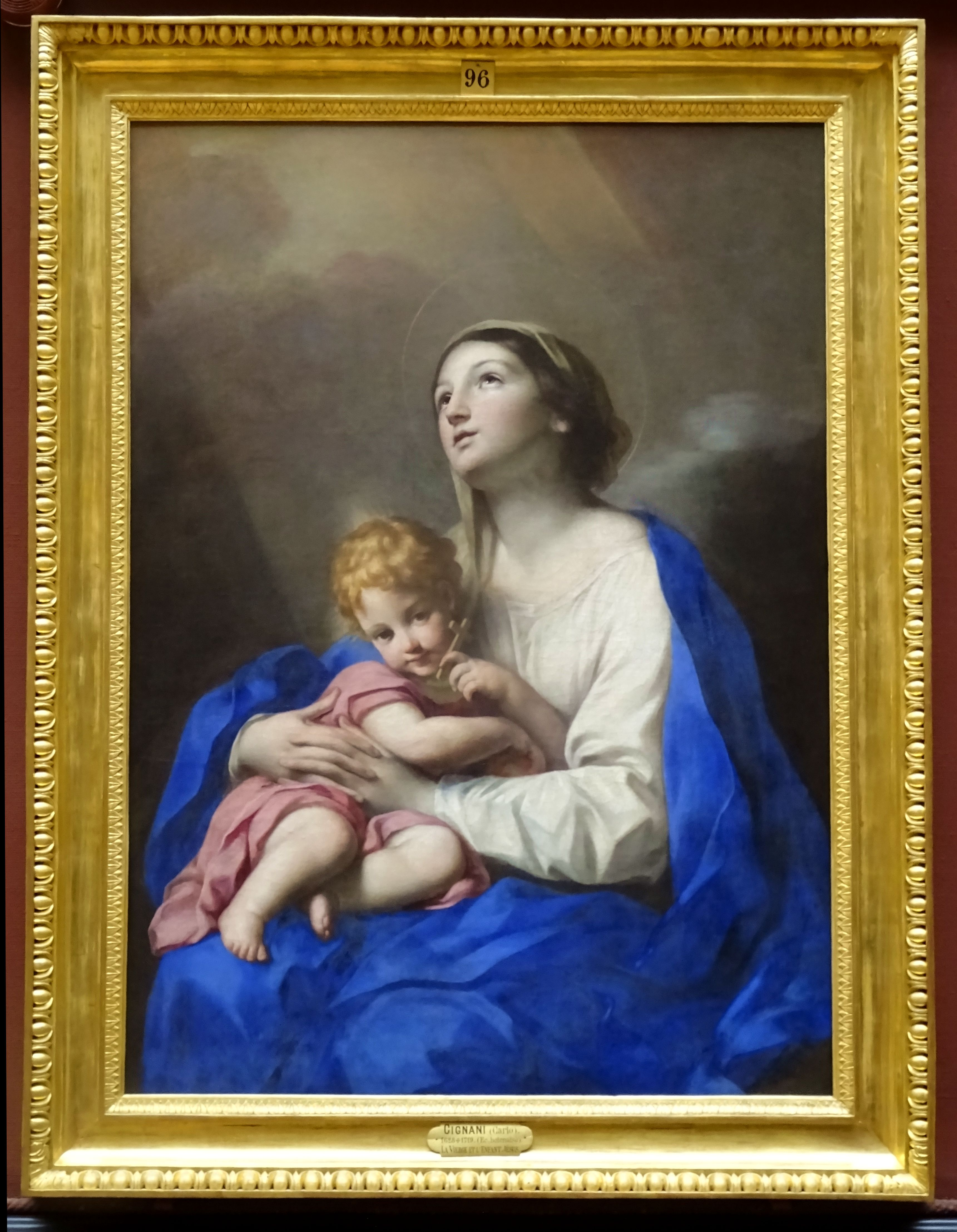 Carlo Cignani, La Vierge et l'Enfant Jésus.